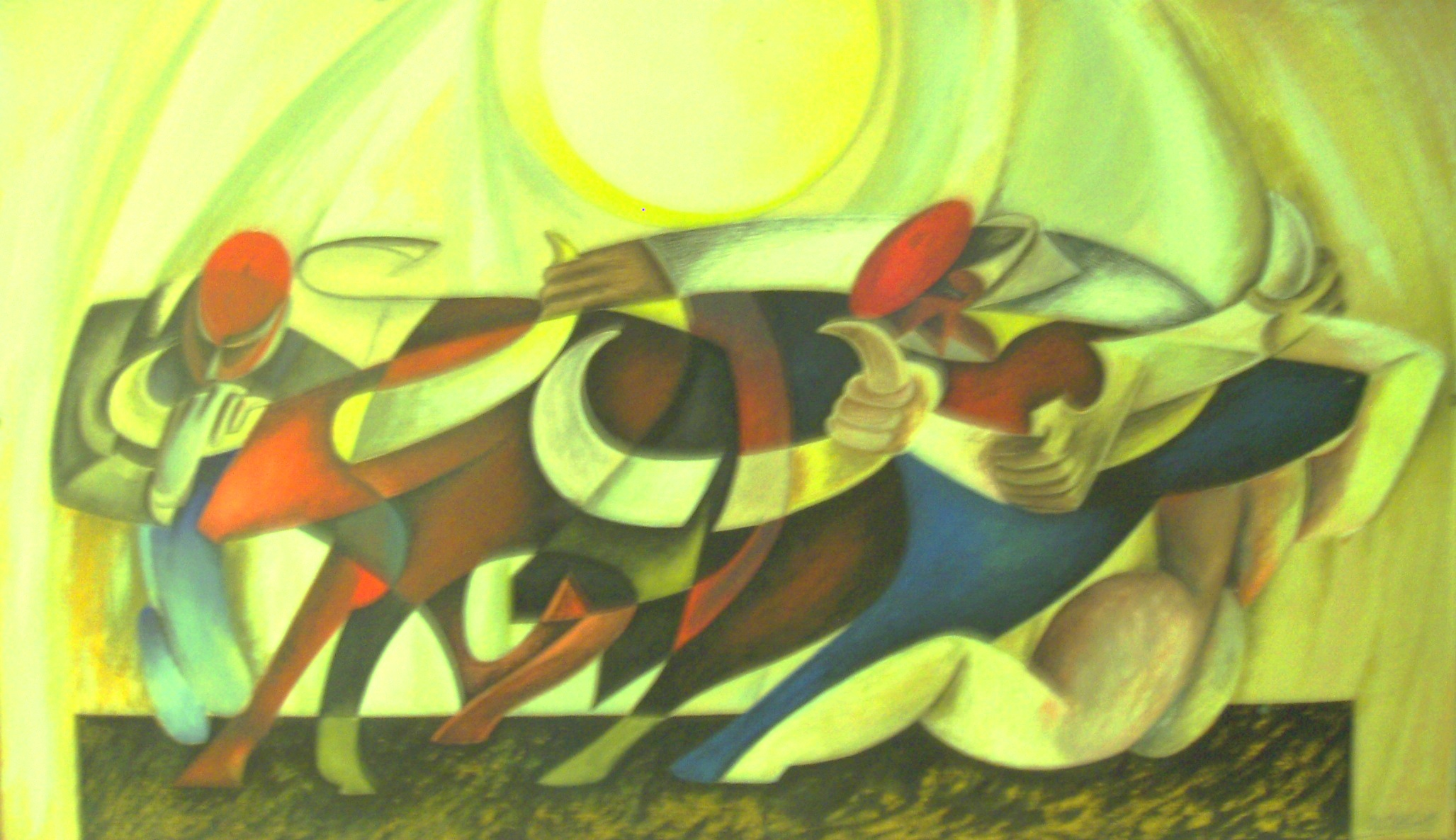 Acrílico y tinta sobre papel. 24x35. Barcelona, España. 1974